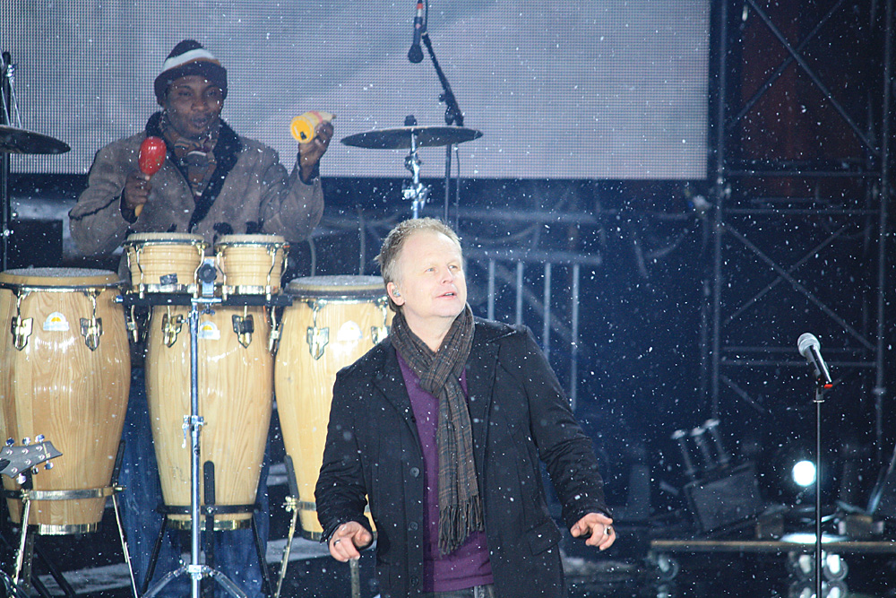 Herbert Grönemeyer - Herbert Grönemeyer singt seine offizielle Hymne "Komm zur Ruhr" am 09.01.2010 auf der Eröffnungsfeier zur RUHR.2010 in Essen Zollverein. Im Hintergrund: Mark Kofi Essien